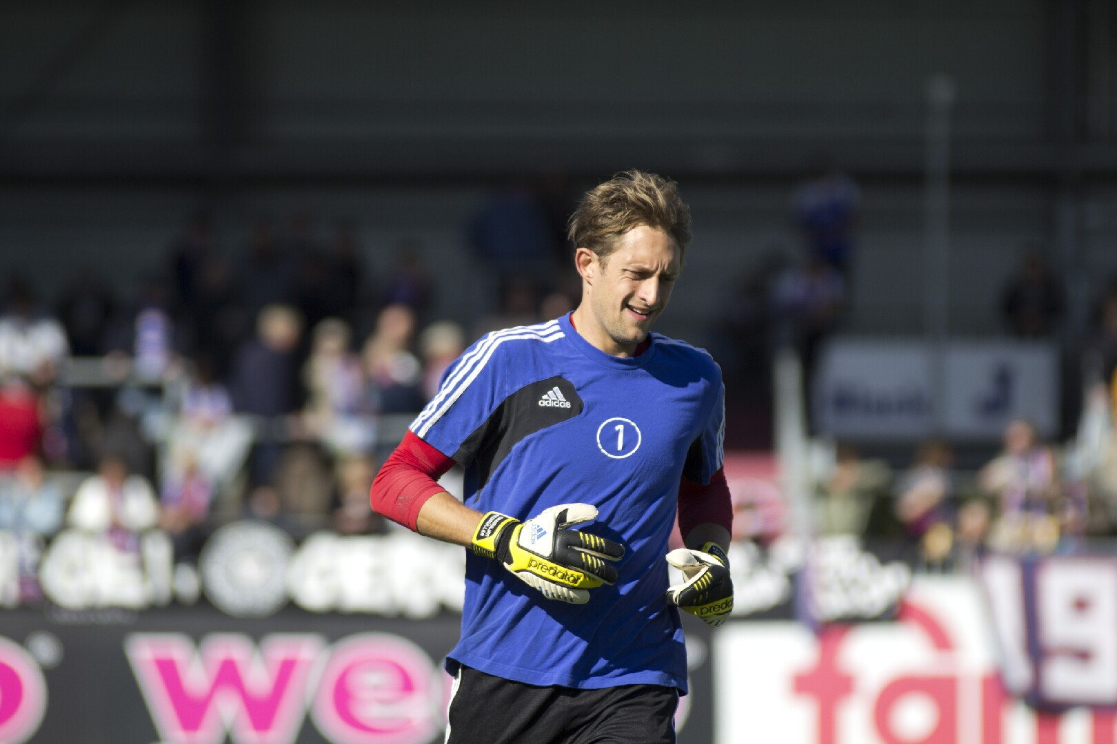 Maximilian Riedmüller